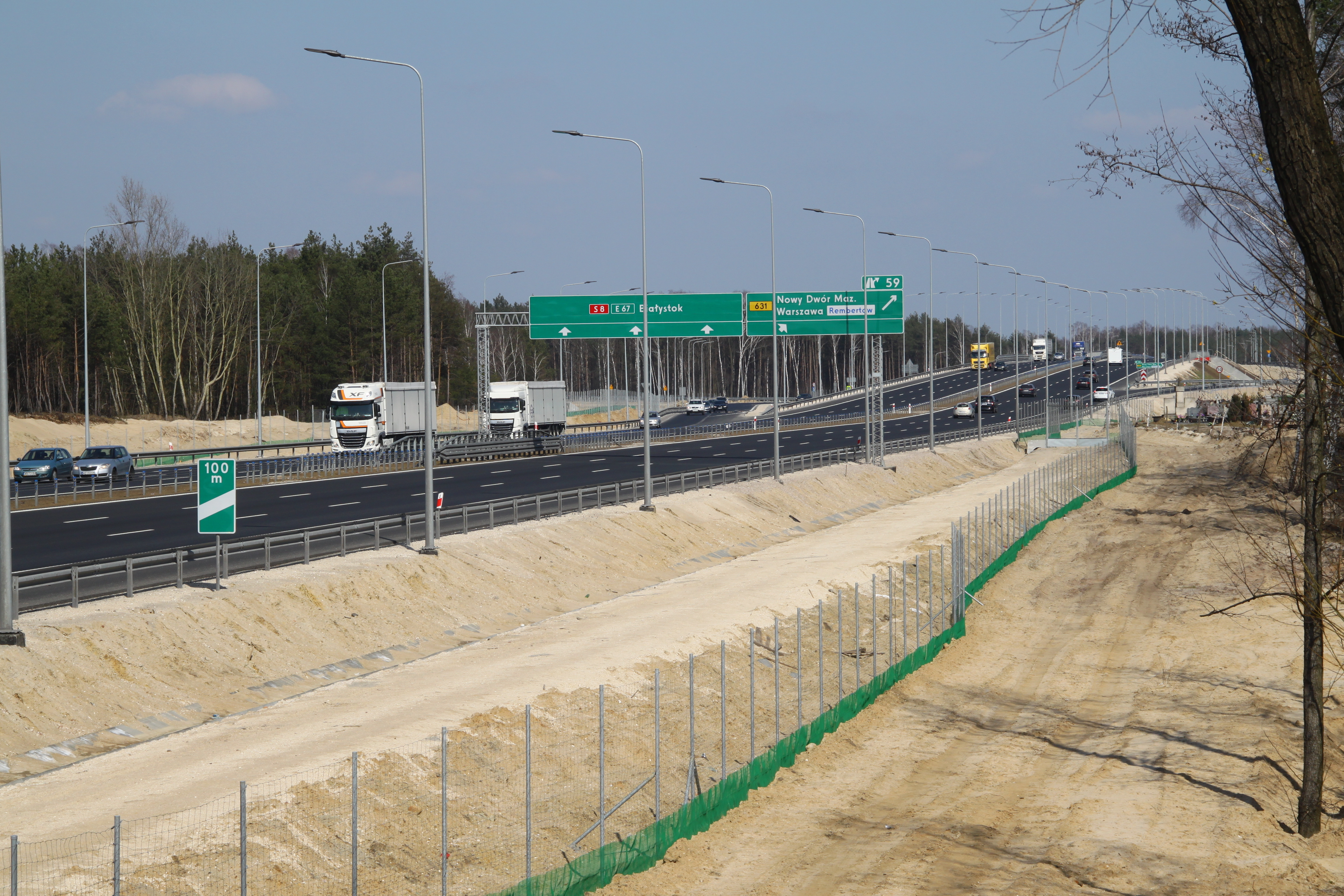 Obwodnica Marek sfotografowana z obiektu KP-20. Widok w kierunku węzła Zielonka, Polska